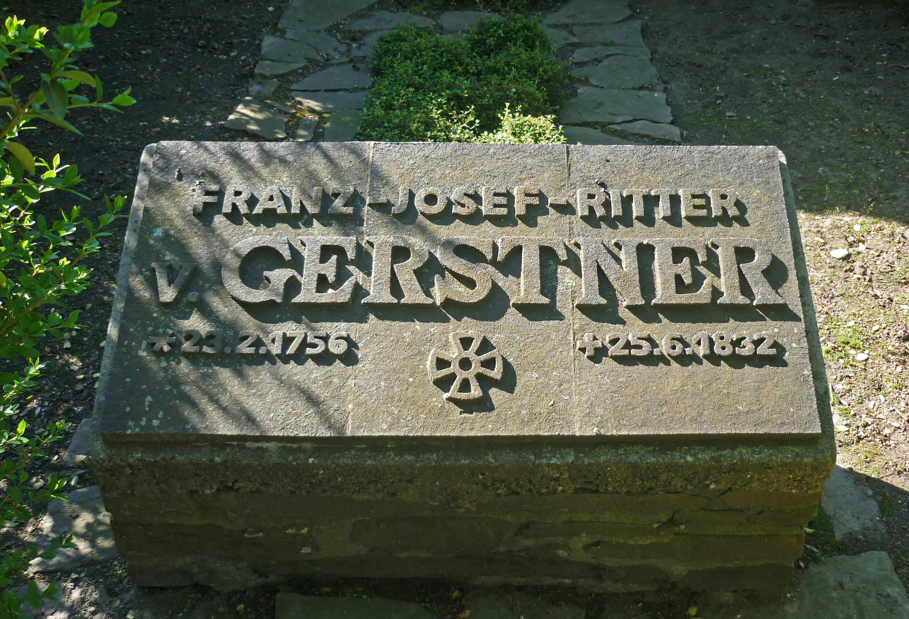 Grabstätte von Franz Josef Ritter von Gerstner (1756-1832) auf dem Friedhof von Komotau/Chomutov